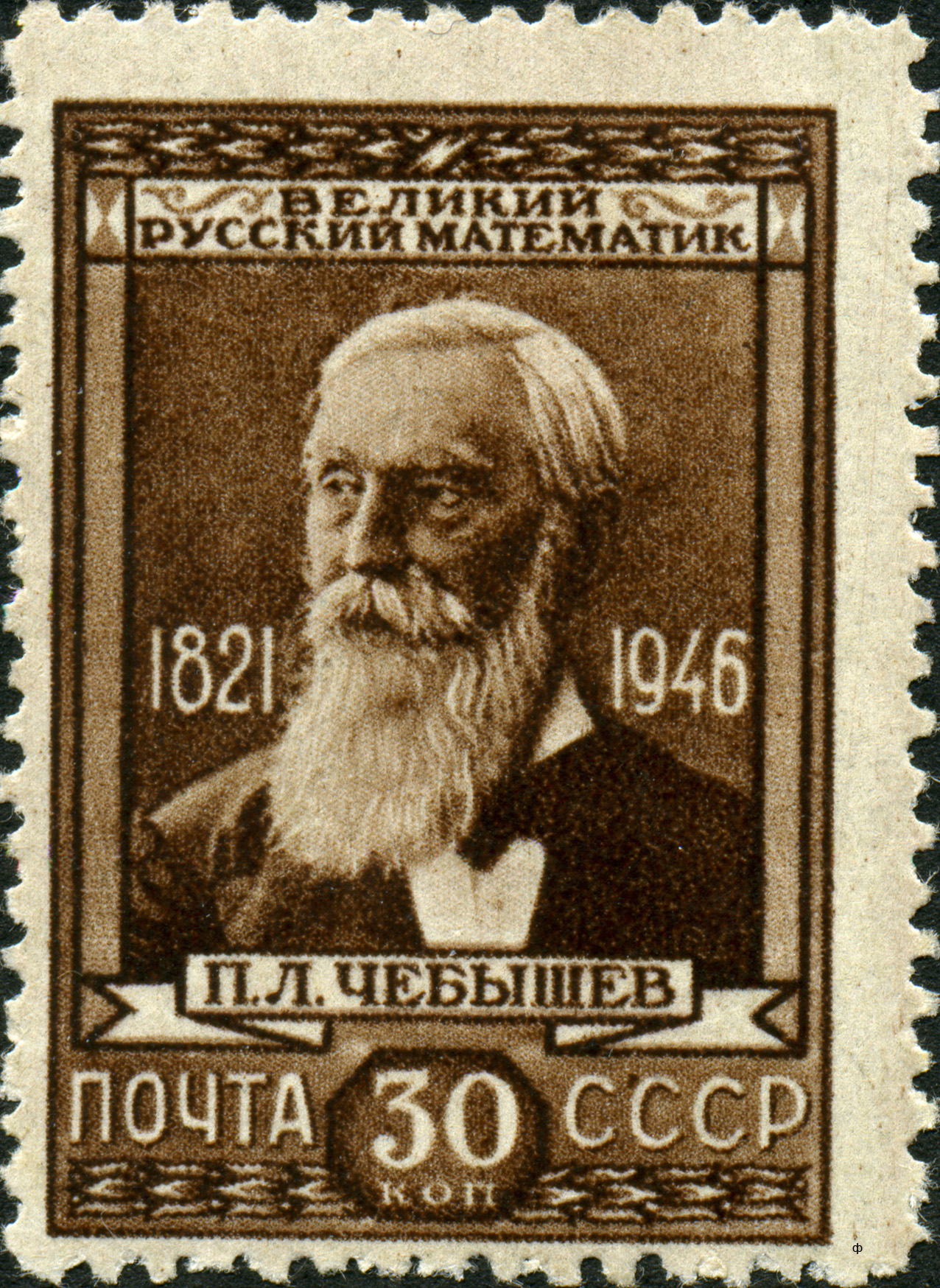 Марка СССР